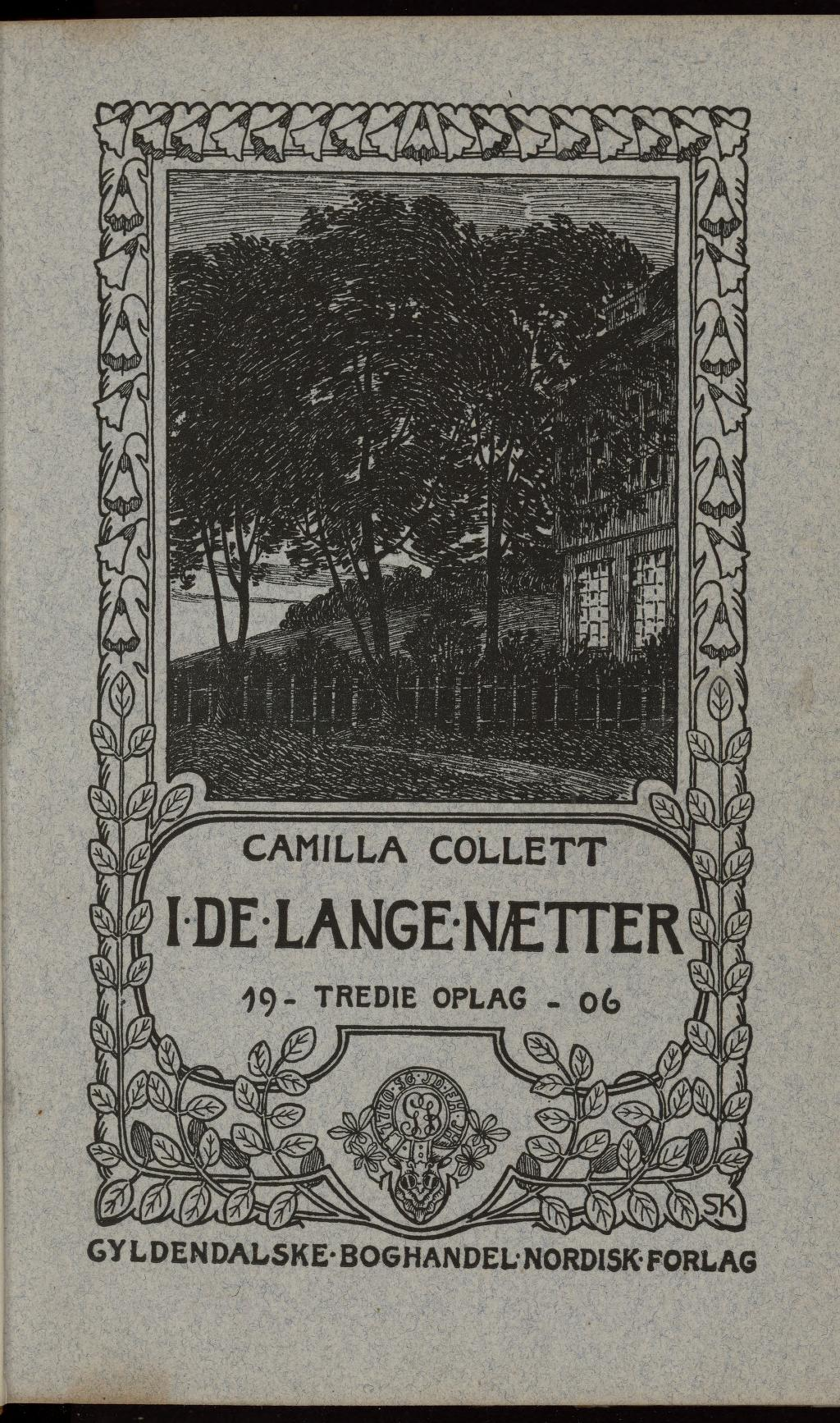 Omslaget til I de lange Nætter fra 1906.